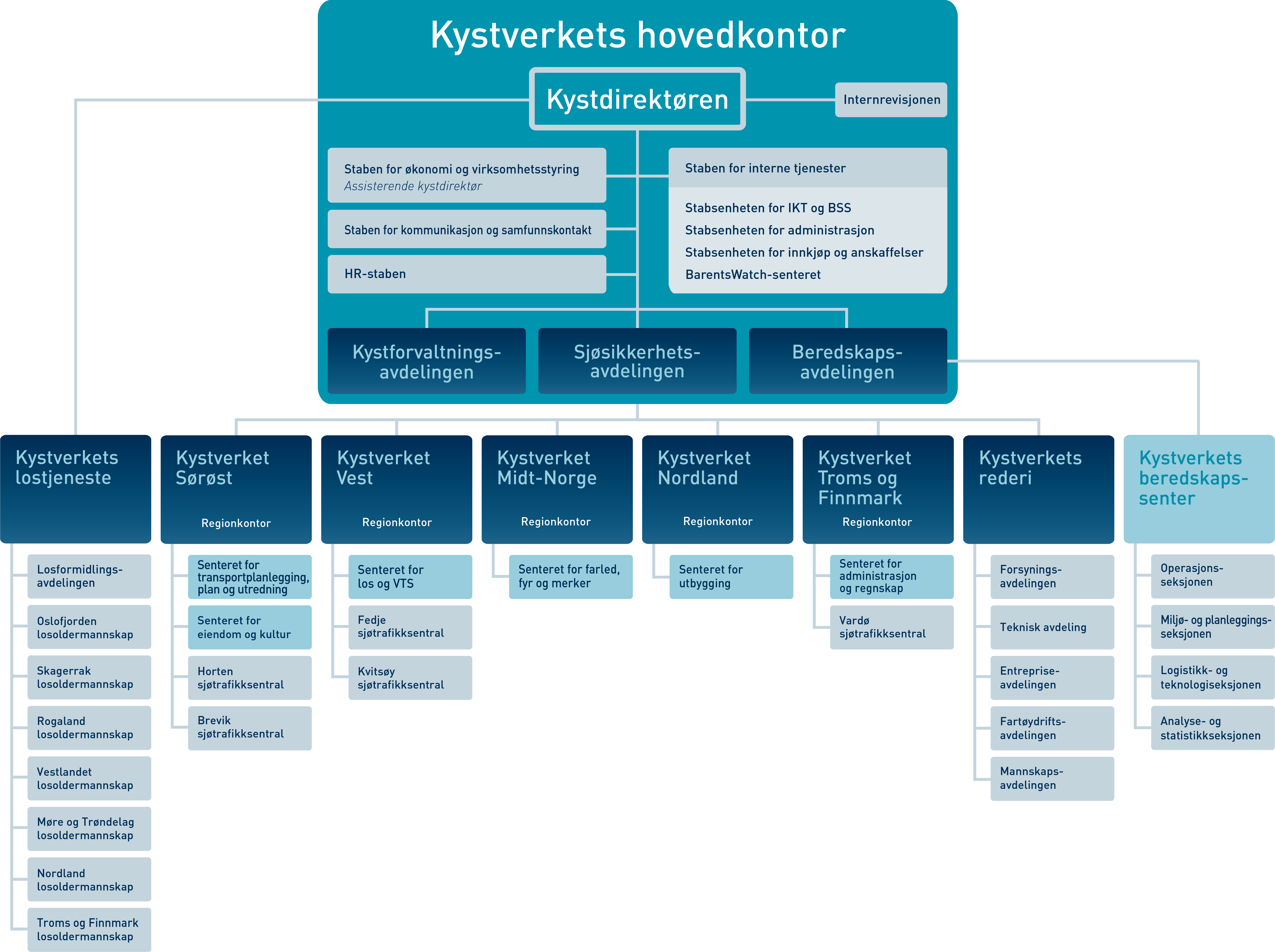 Organisasjonskart for Kystverket, 2020